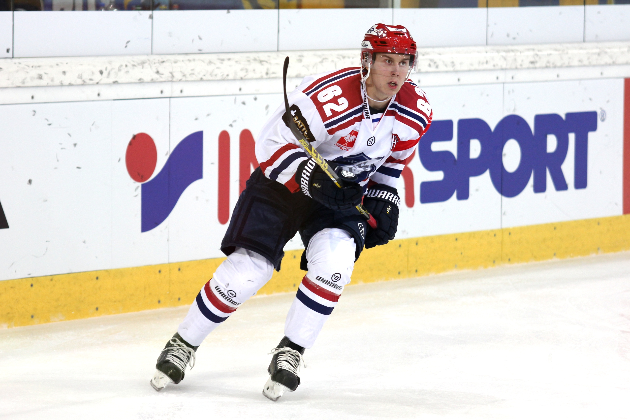 Robert Leino (H 62).